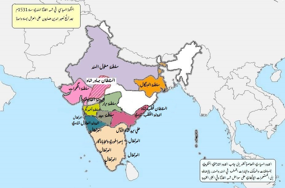 خارطة تبين الدول في شبه القارة الهندية سنة 1531م.